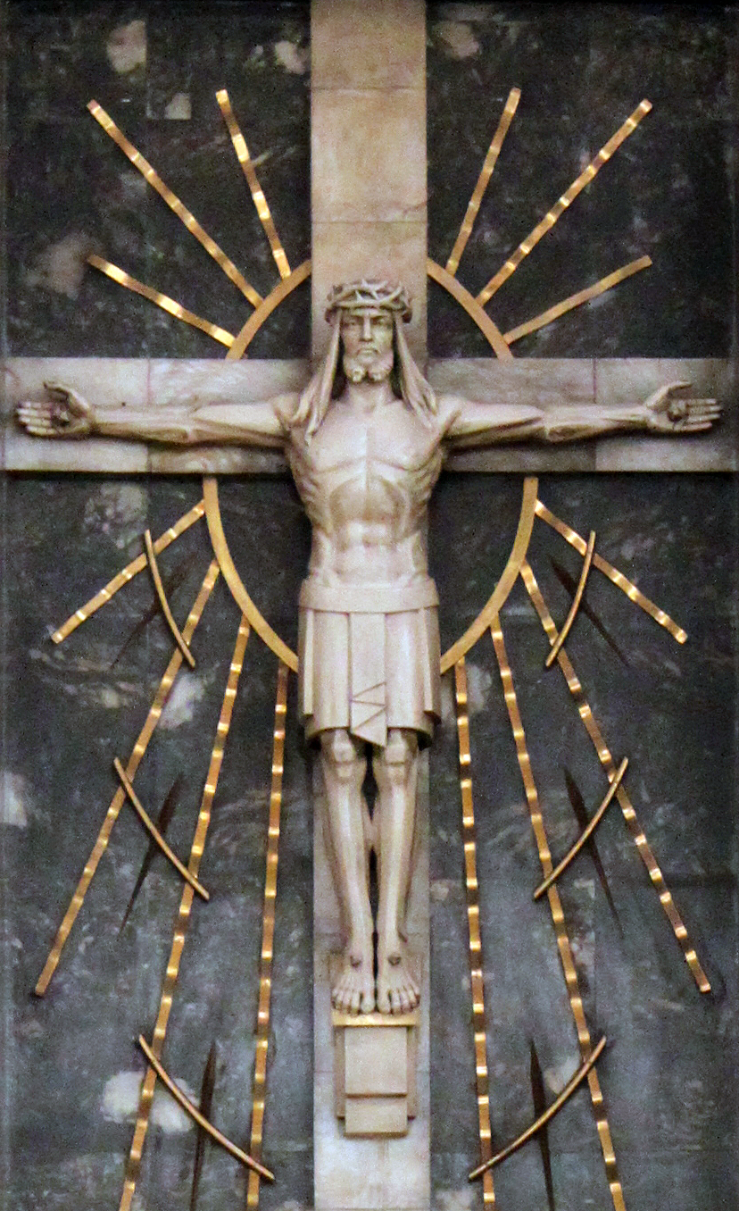 Chrystus na krzyżu. Rzeźba Mariana Spindlera z 1933. Główny ołtarz kościoła garnizonowego w Katowicach.